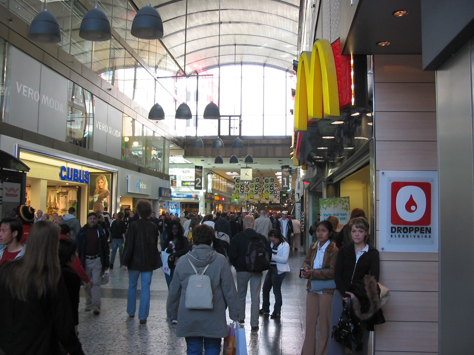 Zelfgemaakte foto, dmv een digitale camera, op 29 mei 2006 bij de ingang van Nordstan die uitkomt op Brunnsparken.